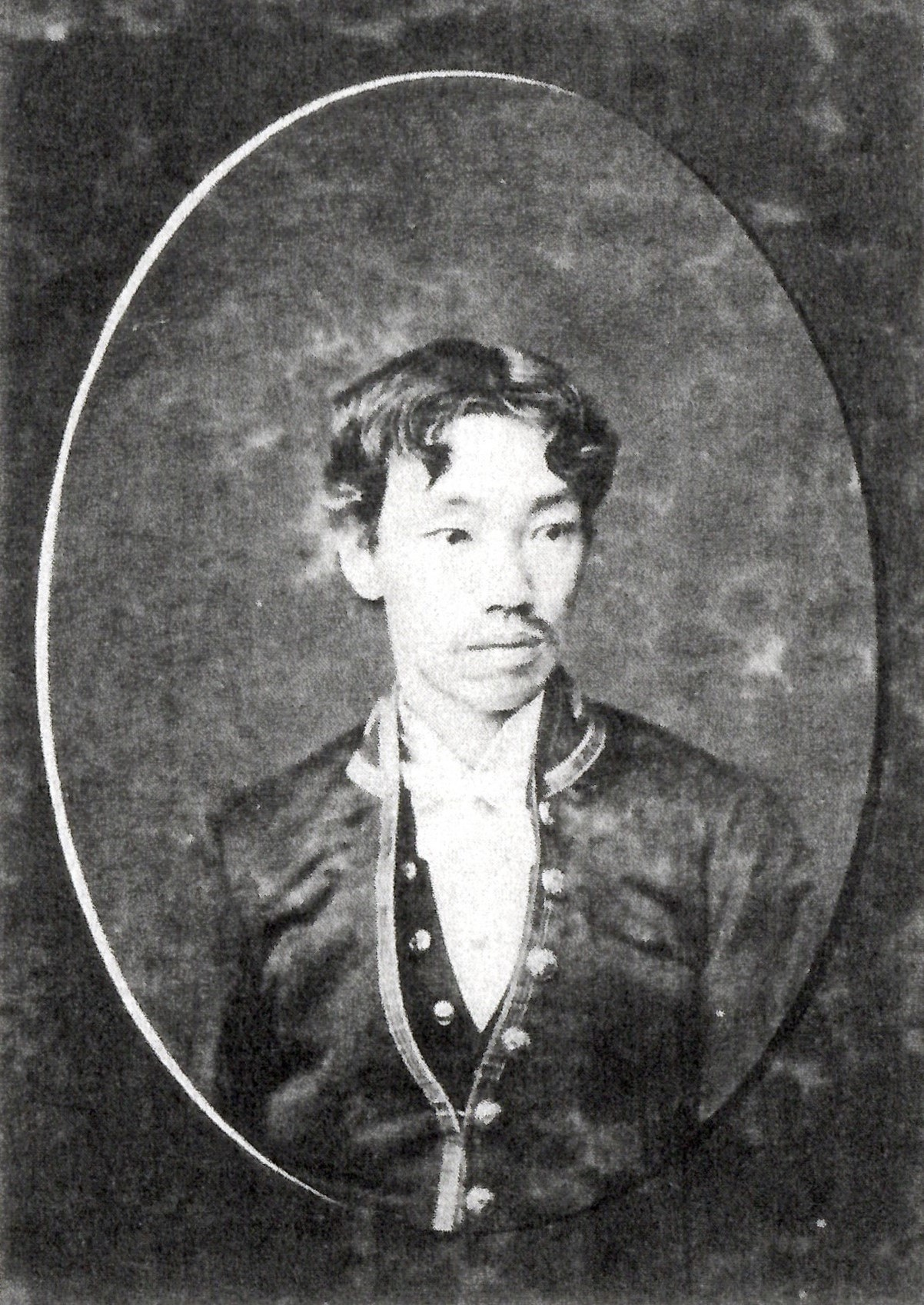 黒田長徳の肖像写真。